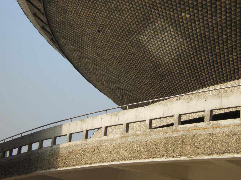 Spodek